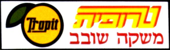 שלט פרסומת לטרופית בגני התערוכה בתל אביב